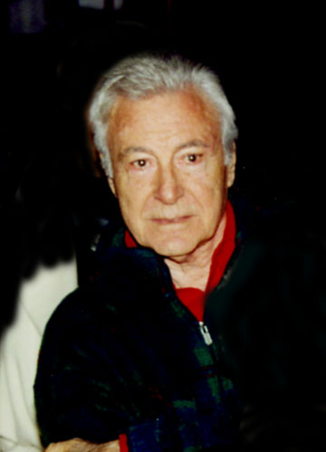 Armando Francioli nel 2000